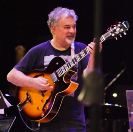 Guillermo Arrom. 21 de noviembre de 2015. En la sala La Ballena Azul del Centro Cultural Kirchner (CCK). Homenaje “Spinetta: Tu vuelo al fin”.